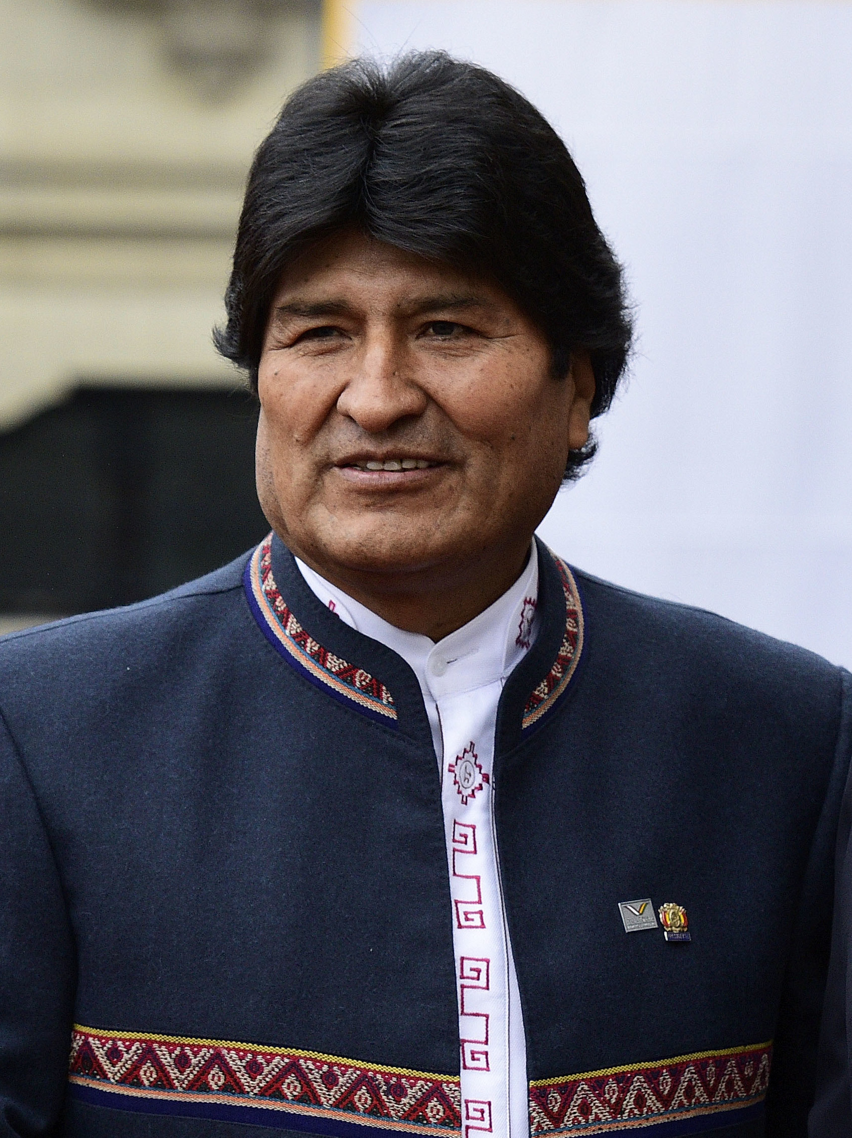 En una ceremonia realizada en el salón Túpac Amaru de Palacio de Gobierno, el Presidente Pedro Pablo Kuczynski junto a su homólogo de Bolivia, Evo Morales, inauguraron la sesión plenaria del III Gabinete Binacional Perú-Bolivia